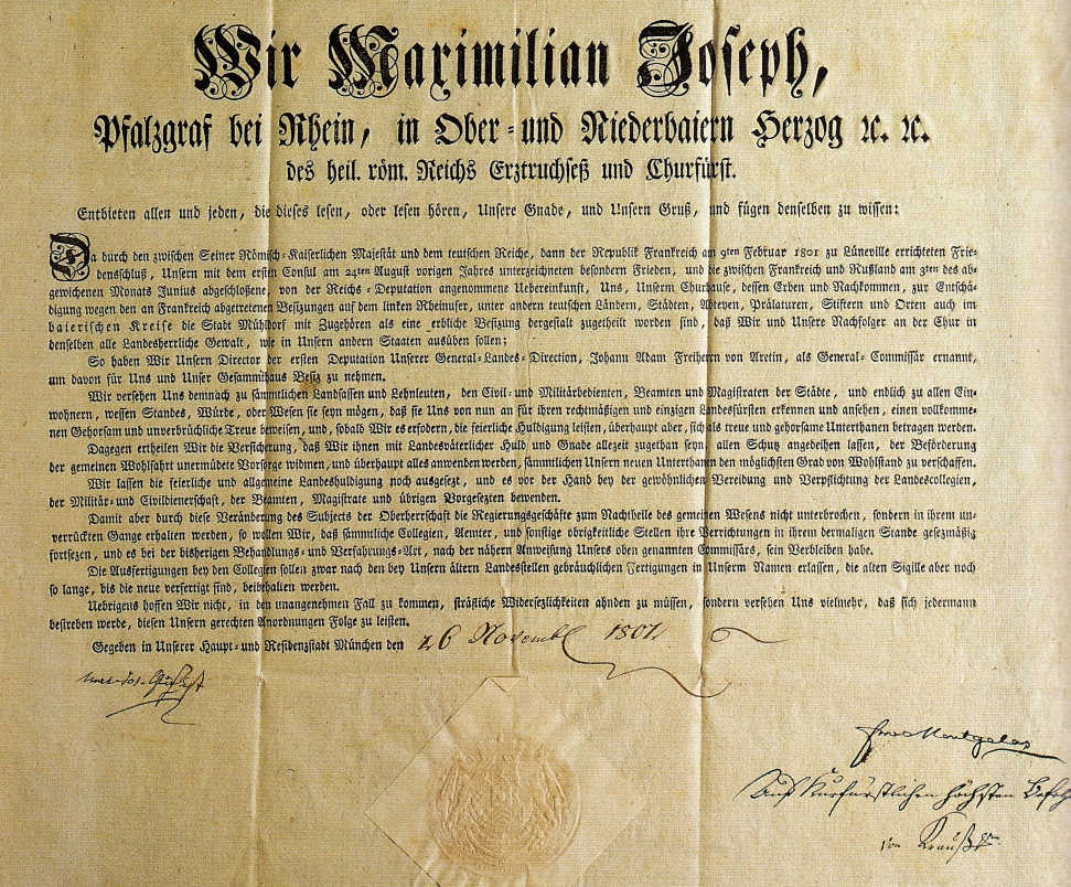 Besitzergreifungspatent für Mühldorf (November 1802)